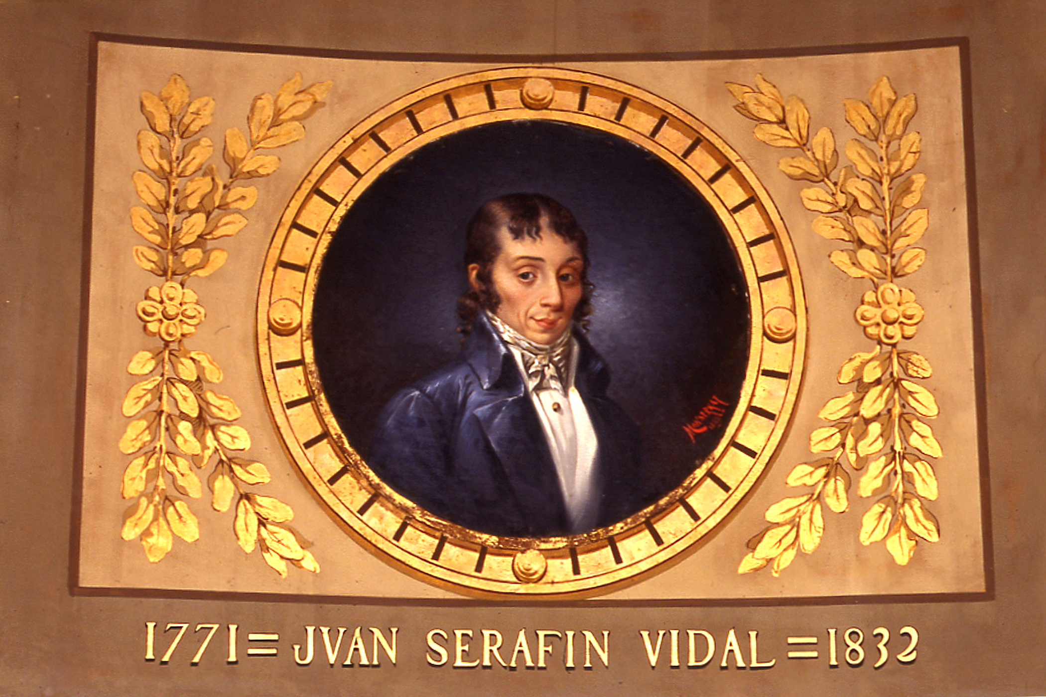 Retrat de Joan Serafín Vidal. pintura sobre tela. Biblioteca Museu Víctor Balaguer